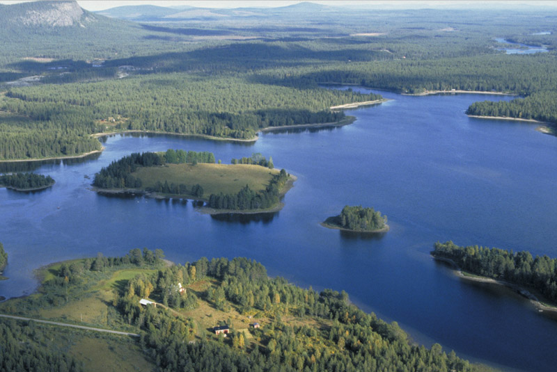 Vid Laisälvens mynning i Vindelälven vid Laisheden. Bilden är tagen mot (väderstreck): Ö Motiv: Bräskafors Nyckelord: Flygbilder, Riksintressen Kategori: Insjömiljöer Vid Laisälvens mynning i Vindelälven vid Laisheden. Bilden är tagen mot (väderstreck): Ö.